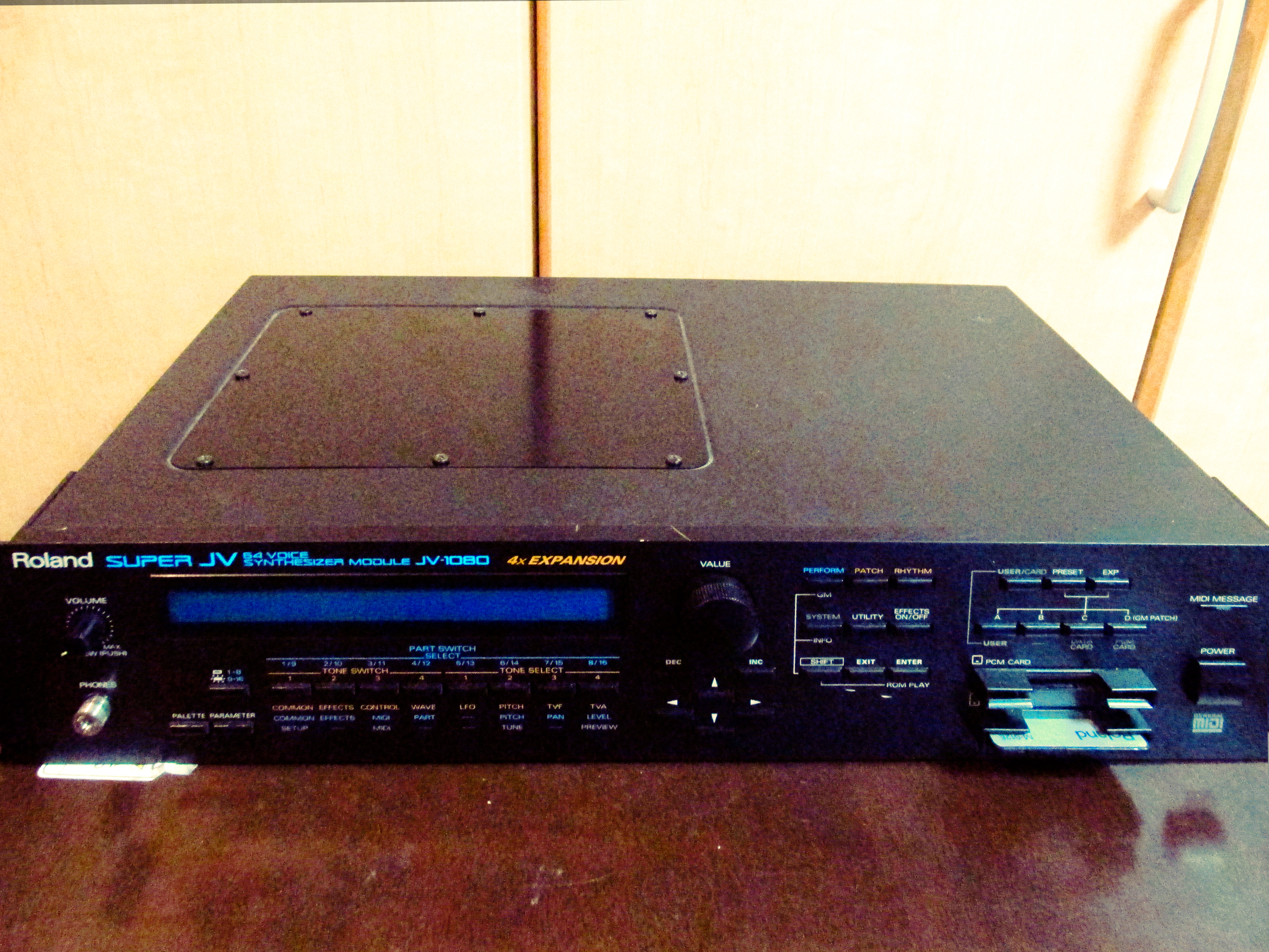 ローランド製シンセサイザJV-1080の全体写真